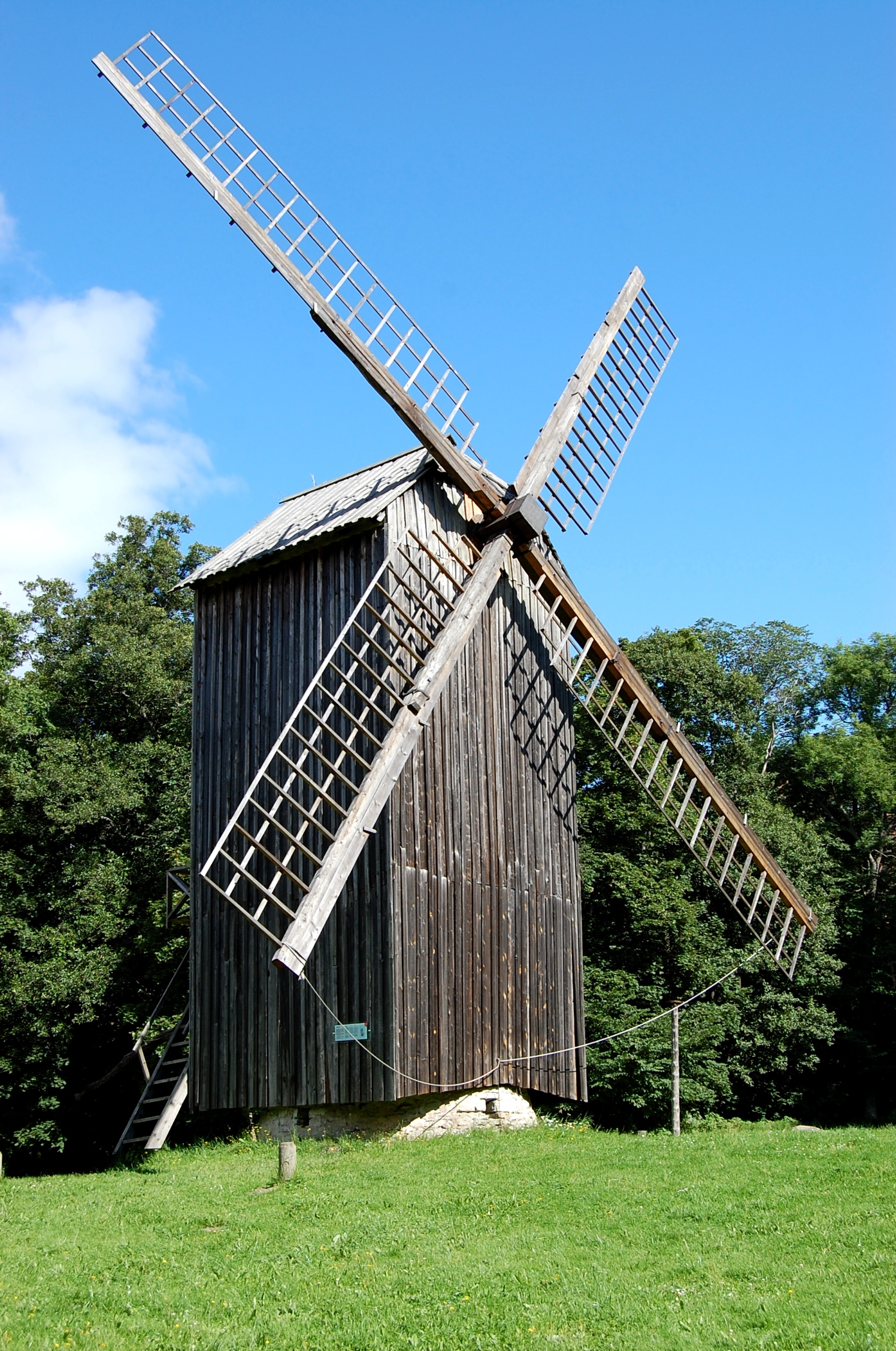 Pukktuulik Eesti Vabaõhumuuseumis